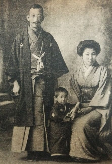 1906年の美濃部達吉と妻子